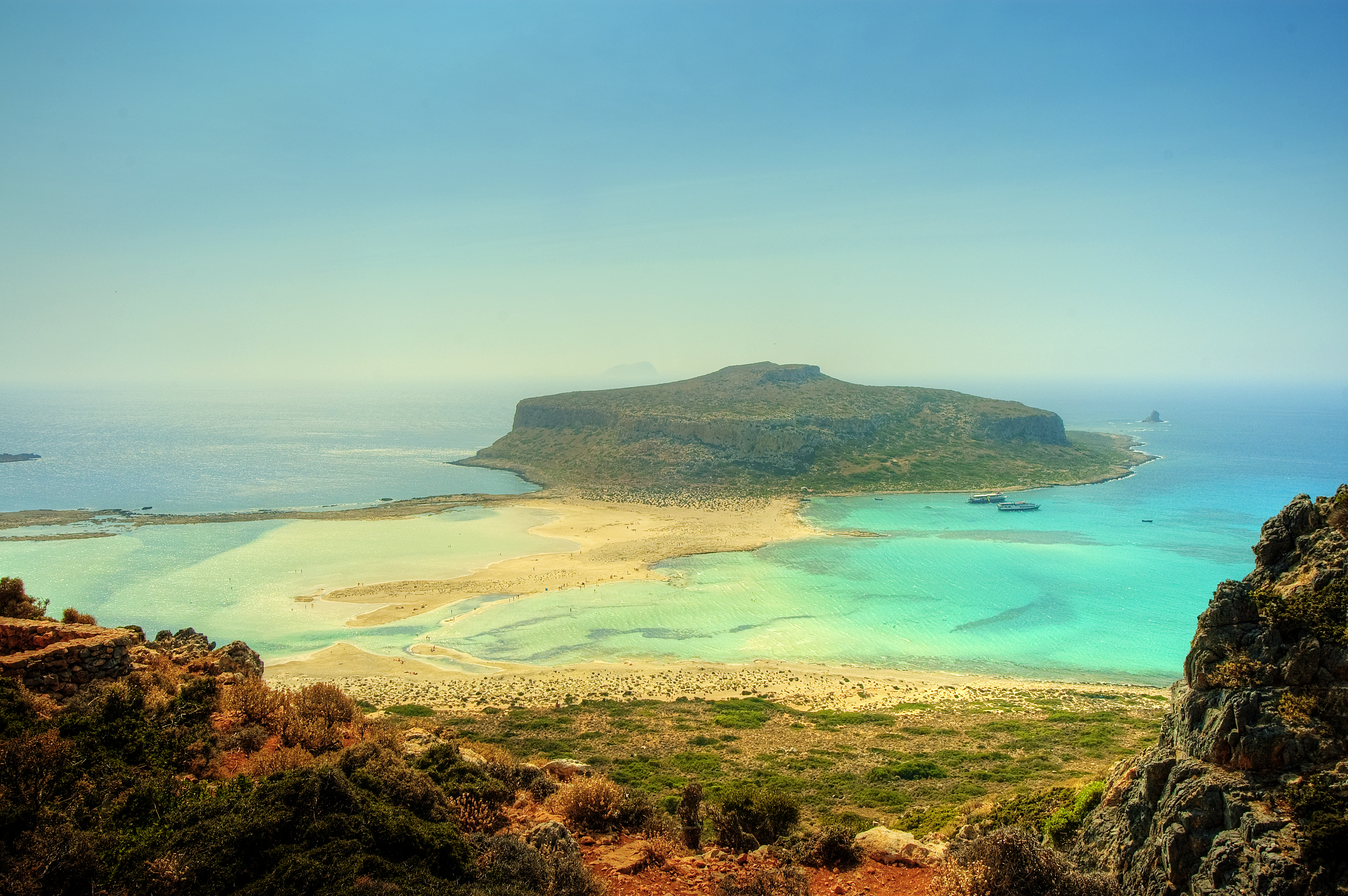 Cap Tigani in Gramvousa